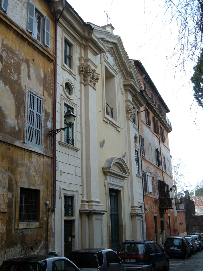 Chiesa dei Santi Giovanni Evangelista e Petronio, chiesa di Roma, nel rione Regola.